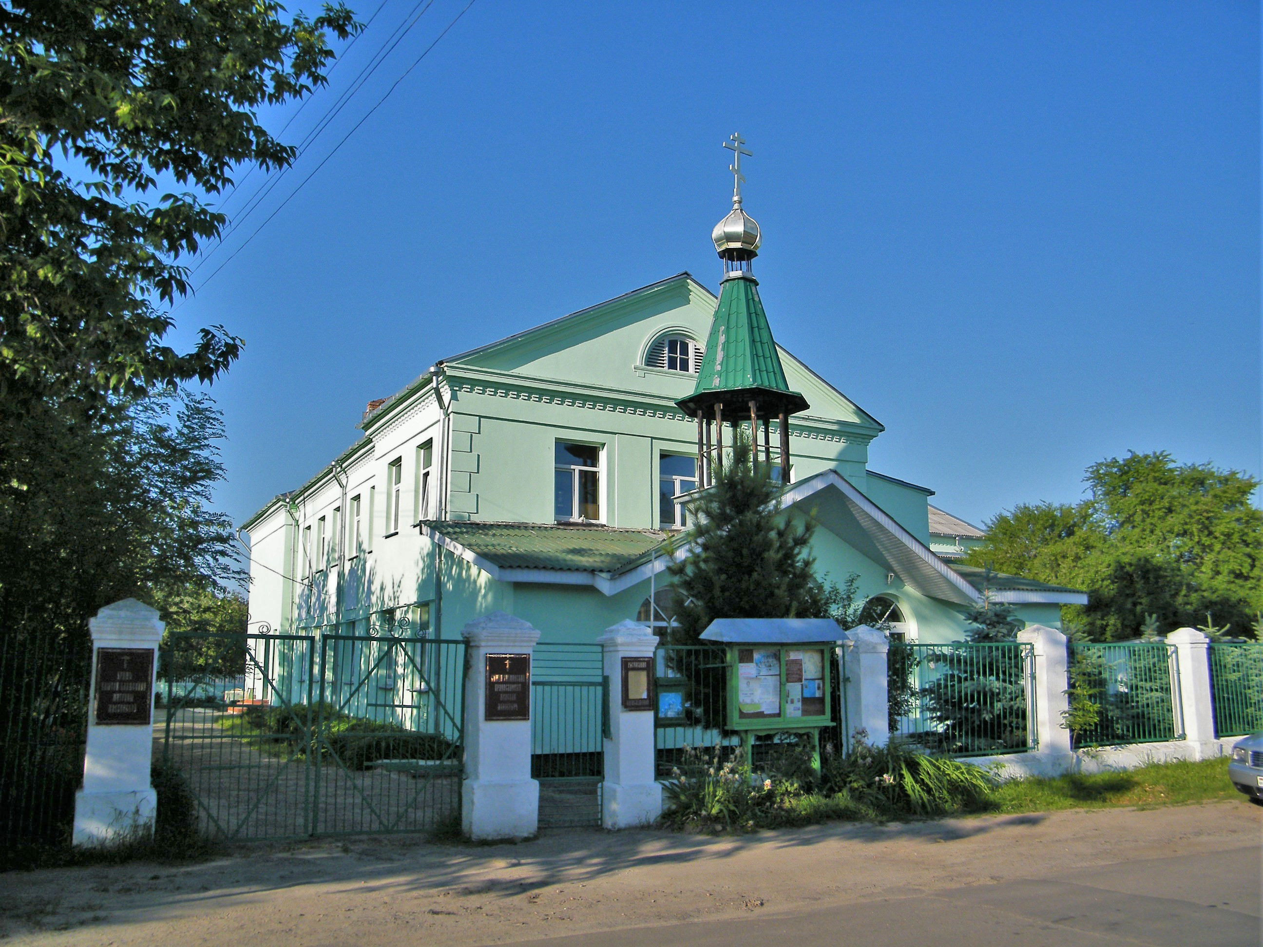 Свято-Тихвинский женский монастырь